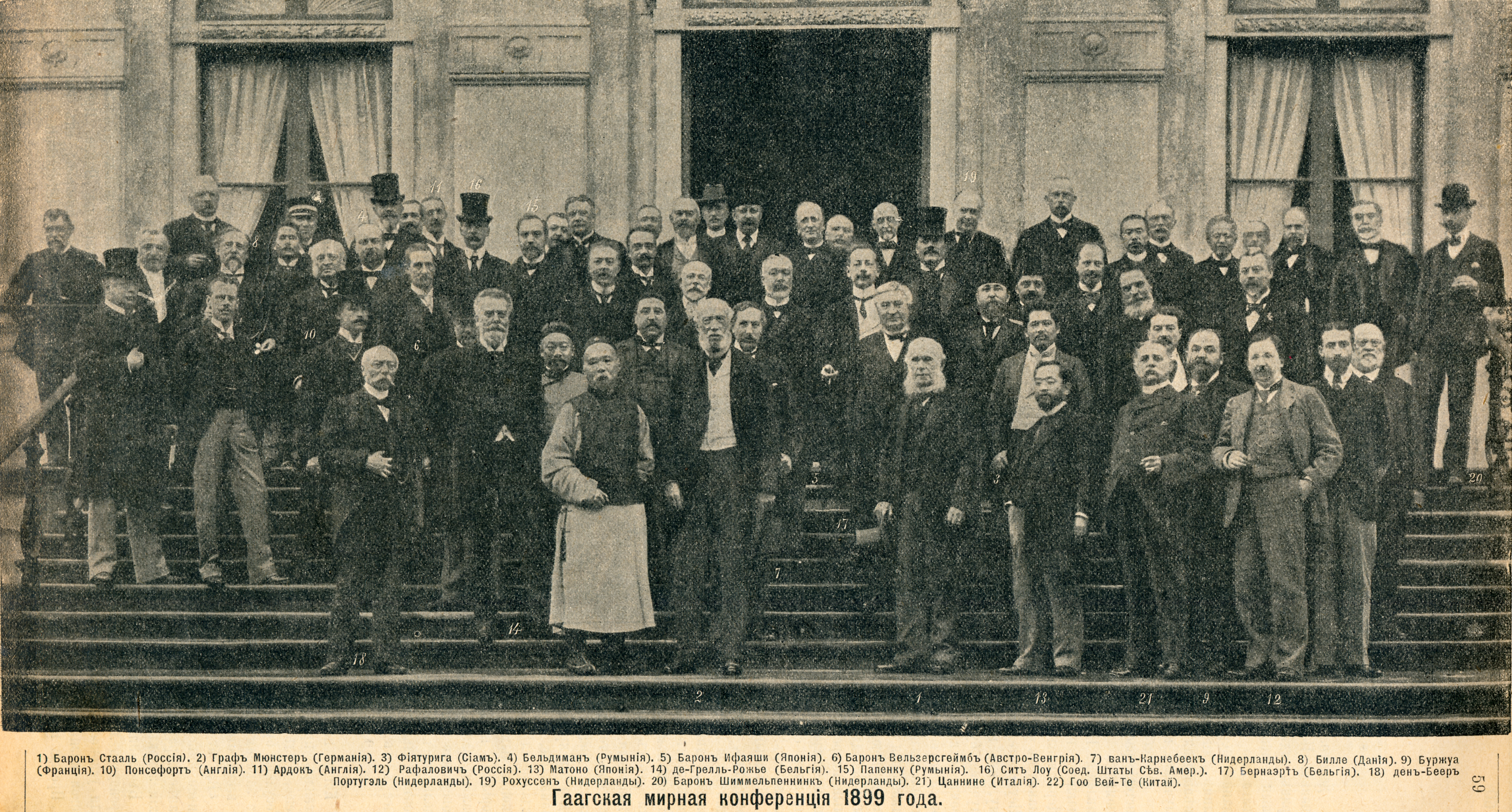 Делегаты Гаагской конференции 1899 года.